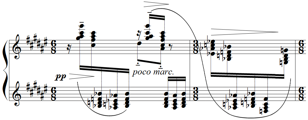 Debussy - Etude "pour les accords", mes.84-85